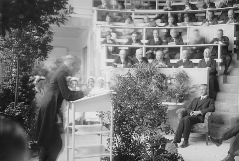 Die Einweihung der chirurgischen Universitäts-Klinik in der Schumannstrasse in Berlin! Der Umbau wurde auf Anraten des Geheim-Rates Sauerbruch des Leiters der chirurgischen Klinik ausgeführt. Der Festakt im Hörsaal der chirurgischen Universitäts-Klinik in Berlin. Am Rednerpult Geheimrat Sauerbruch während der Festrede.